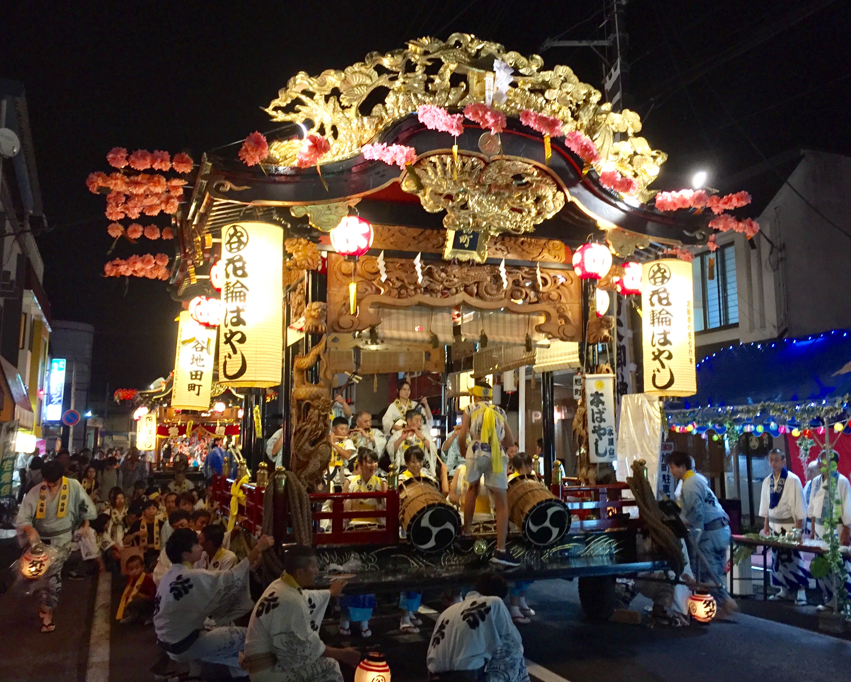 花輪ばやしの谷地田町屋台。2017年度の屋台修理事業の際に底部の金網が取り払われ、腰抜け屋台として生まれ変わった。